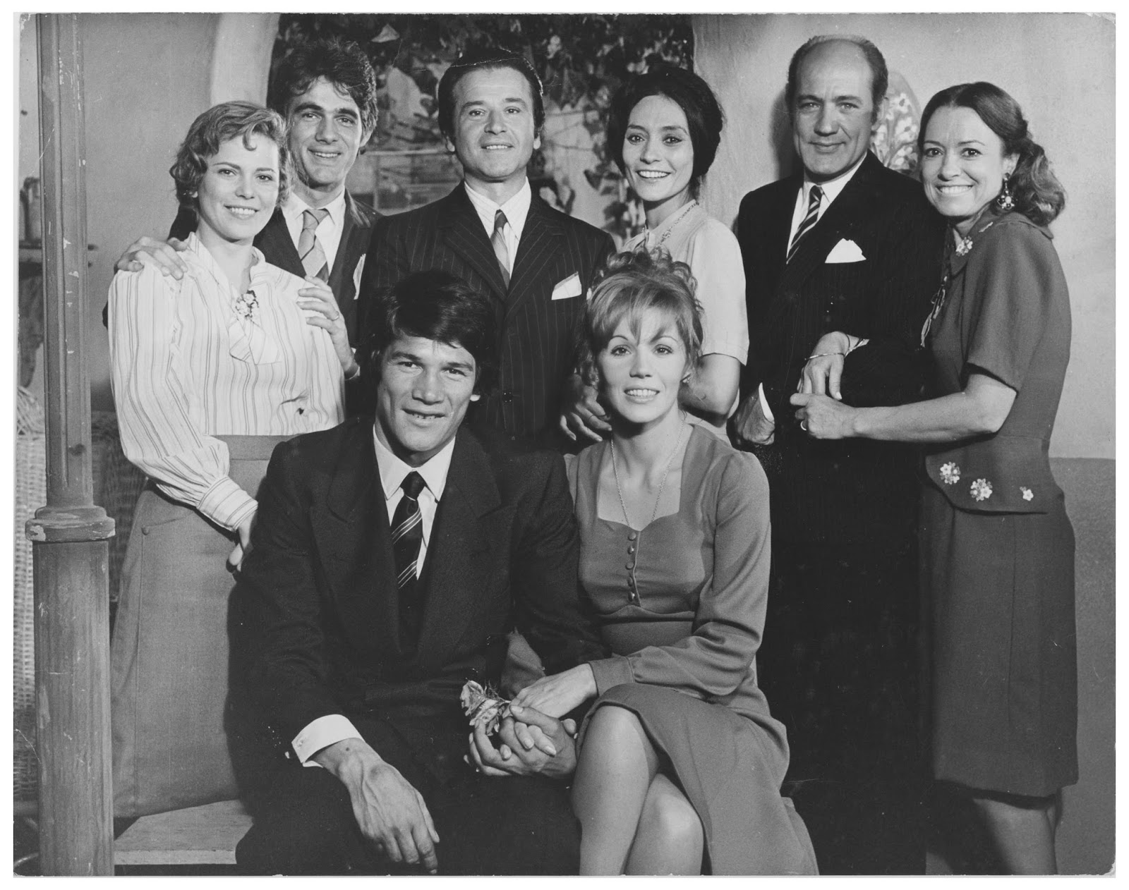 Escena en un interior, con varios personajes. Sentados, el actor Carlos Monzón y la actriz Susana Giménez. De pie y de izquierda a derecha, los siguientes actores: Leonor Manso, Juan José Camero, Alberto Argibay, Dora Baret, Jorge Rivera López y Olga Zubarry.